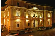 Foto personale. Camera di commercio di Caserta. Rilascio in pubblico dominio.